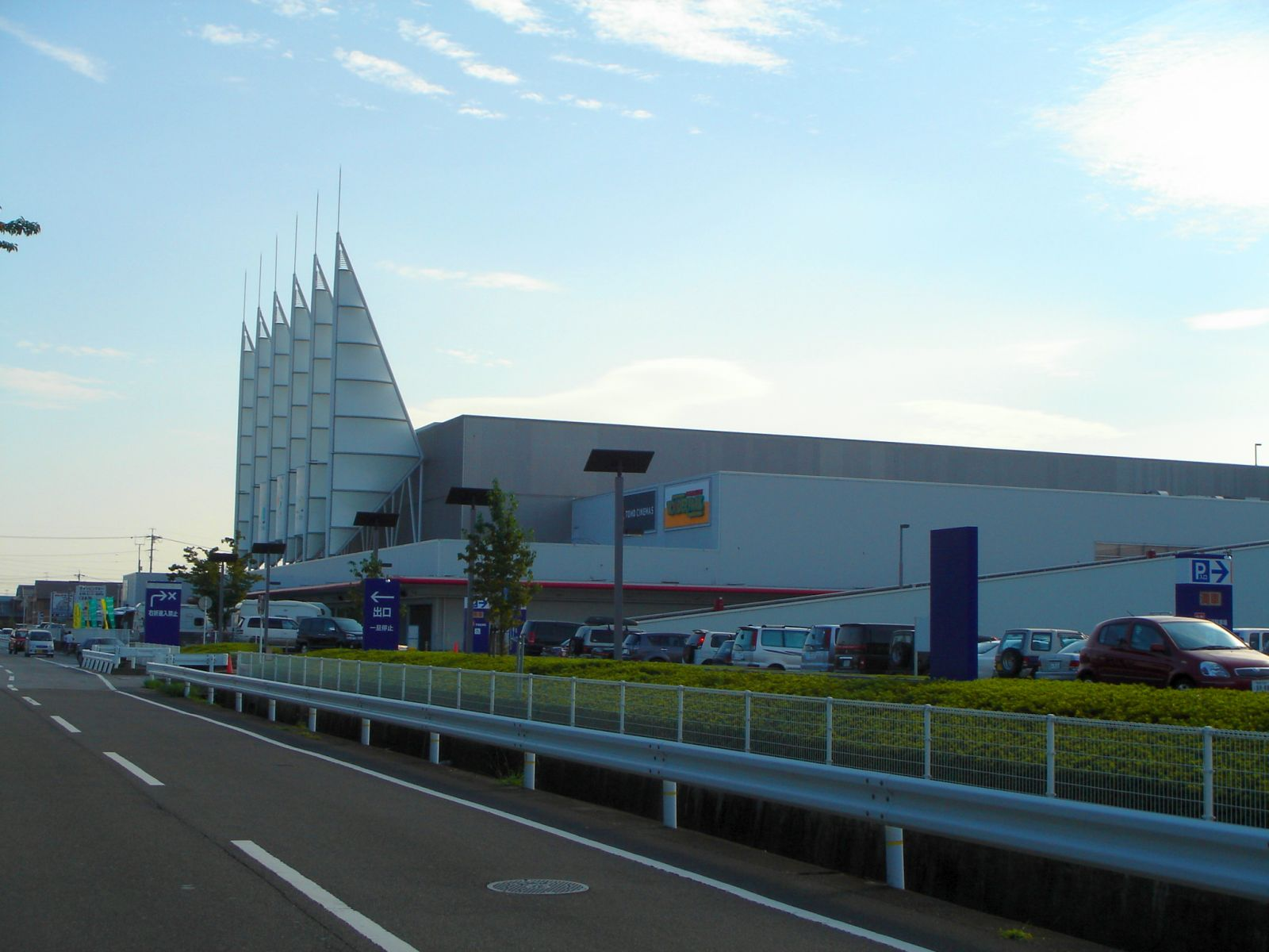 カラフルタウン岐阜、岐阜県岐阜市